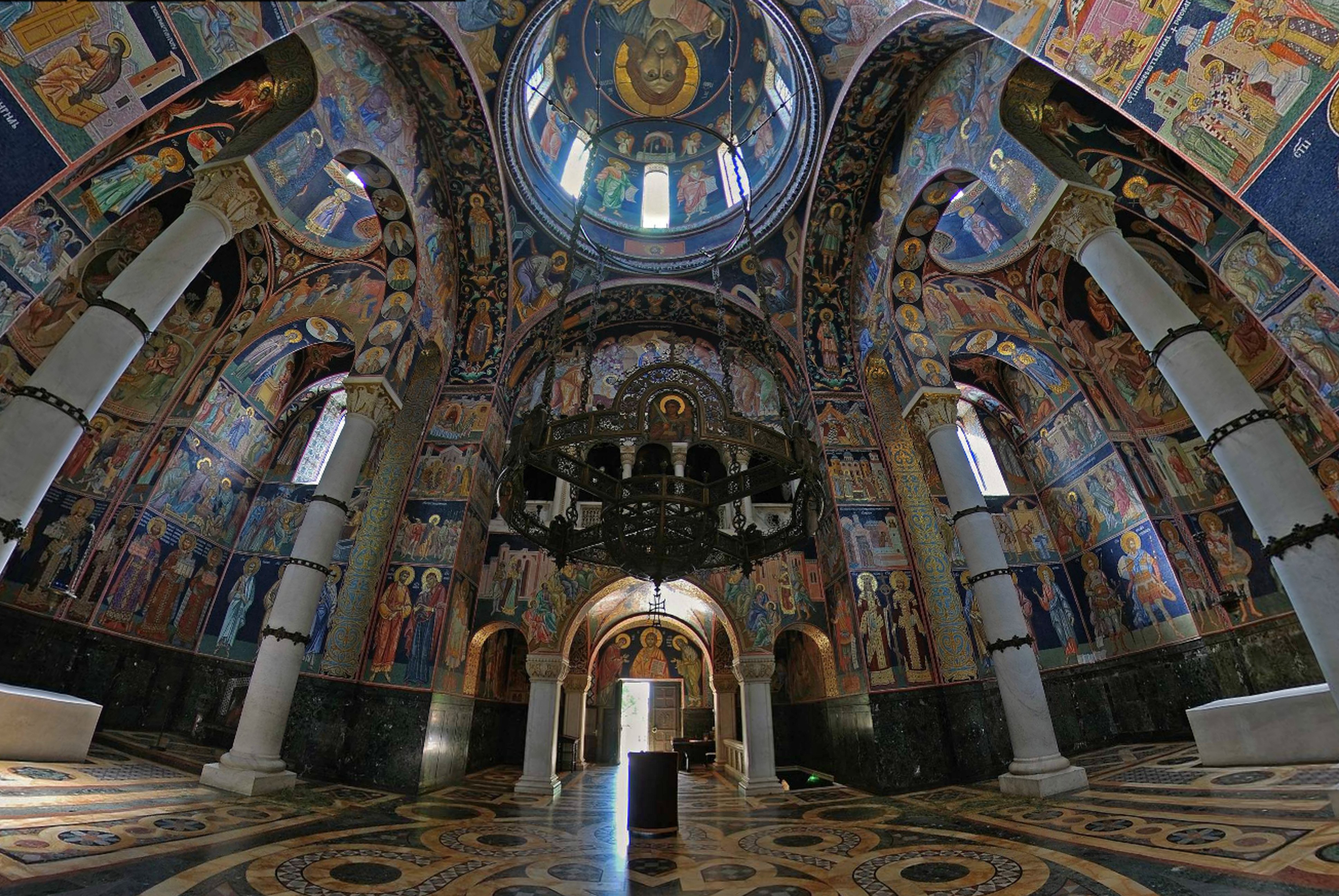 унутрашњост цркве на Опленцу